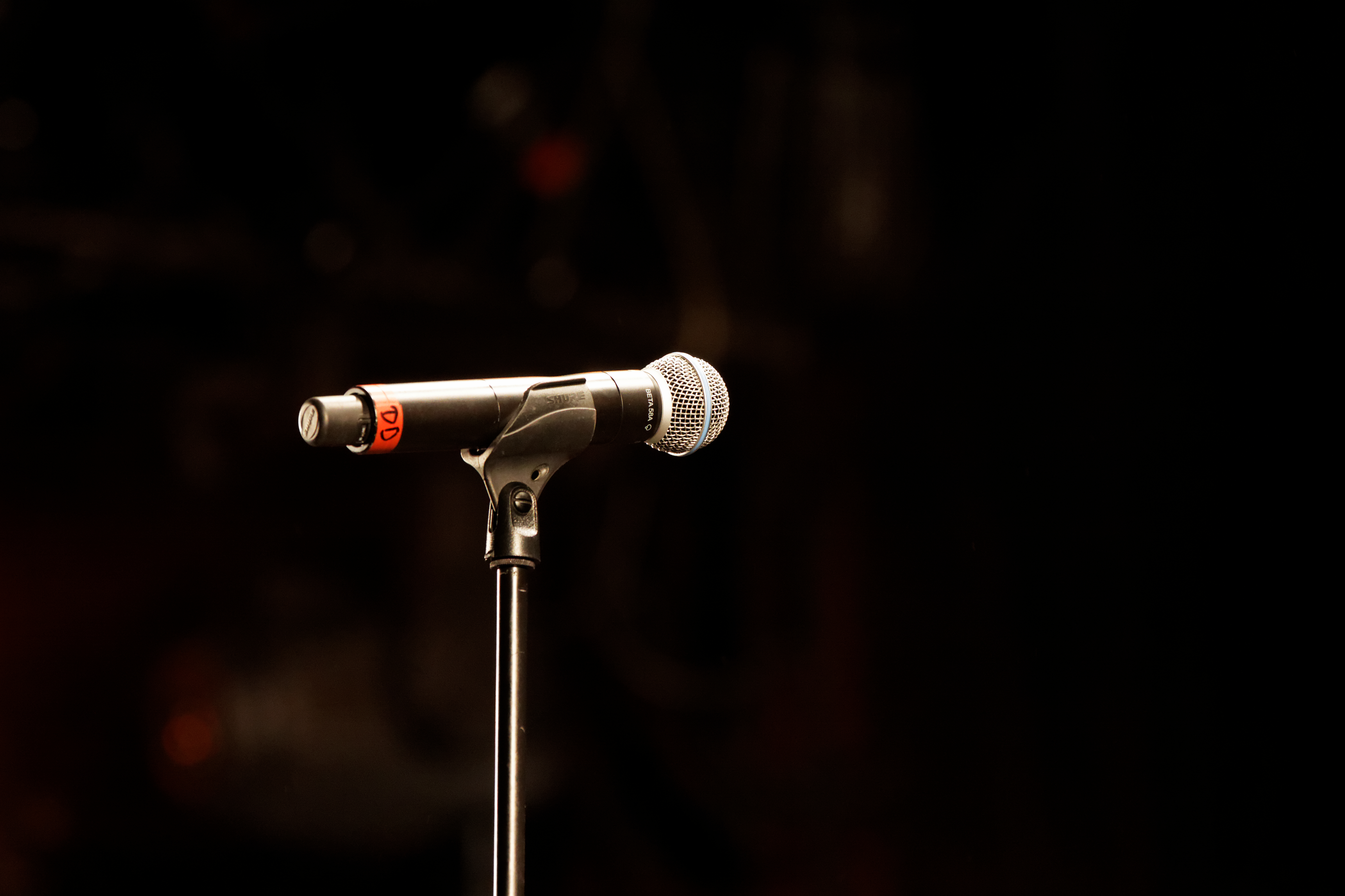 Jimmy Cliff en concert sur la scène Landaoudec lors du festival du bout du Monde à Crozon dans le Finistère (France).